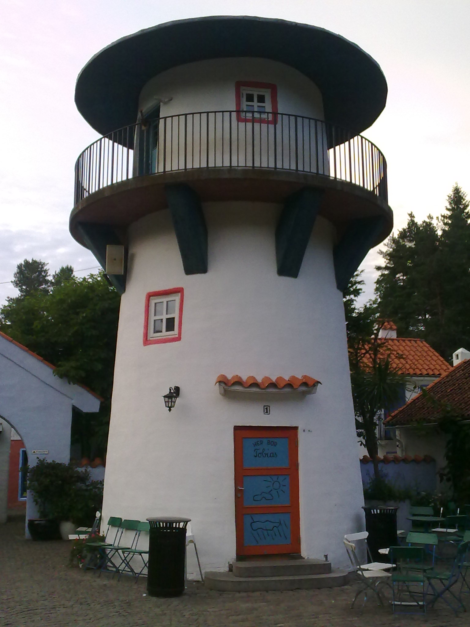 Tårnet til Tobias i Kardemomme by